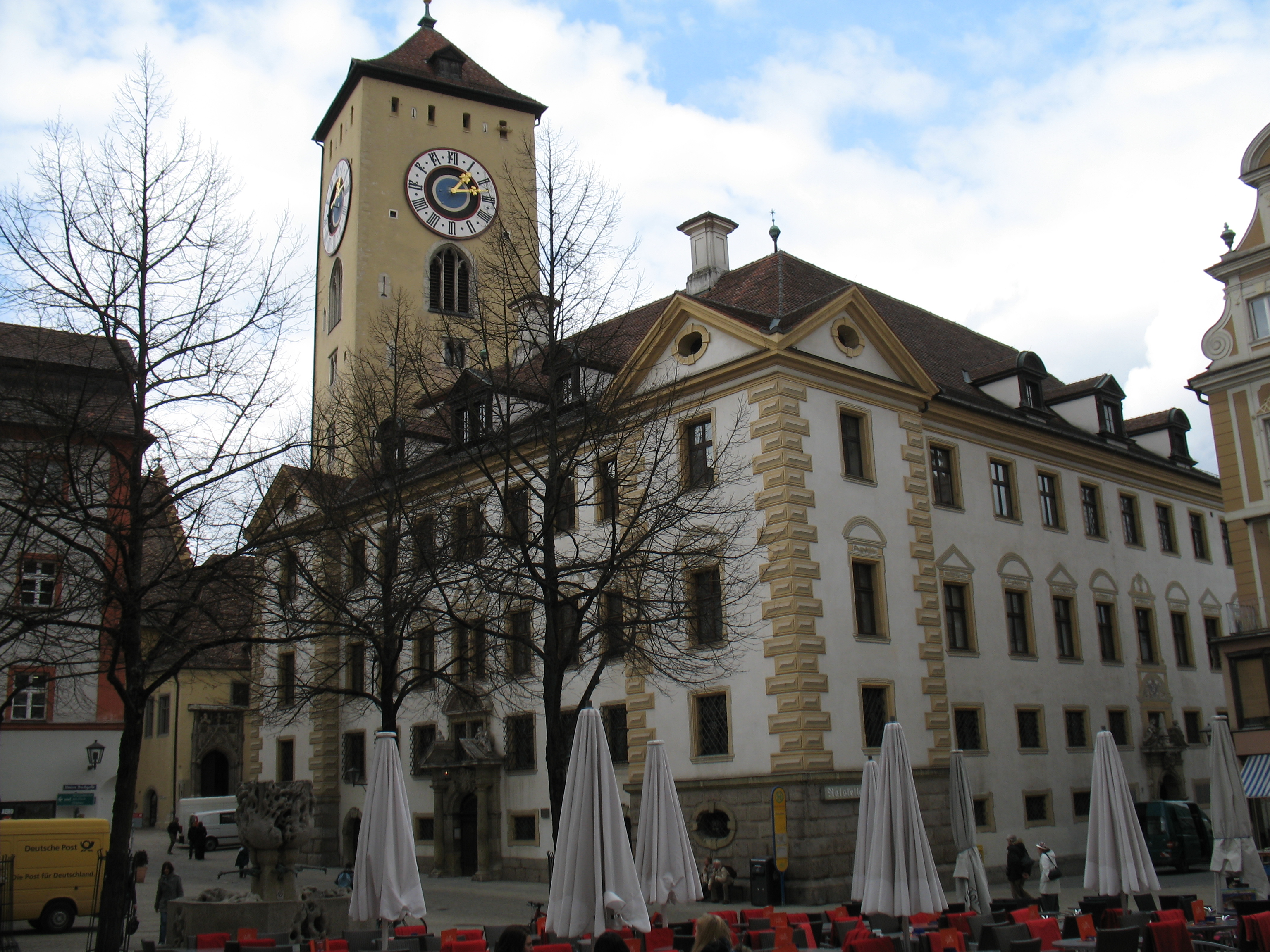 Altes Rathaus, Regensburg